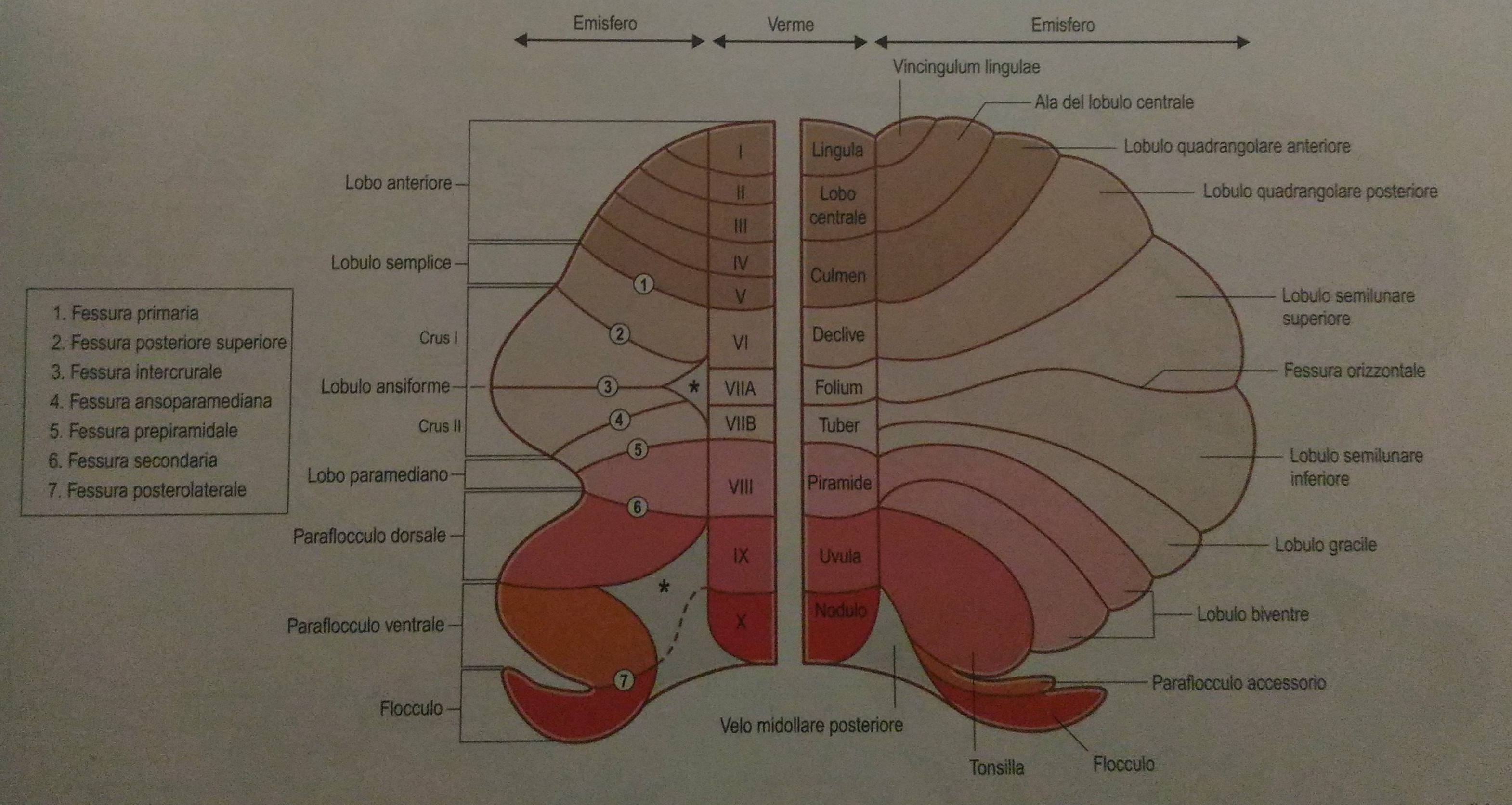 L'immagine mostra schematicamente i lobuli e lobi del cervelletto.